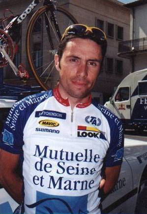 Photo de David Delrieu lors de la saison 1998